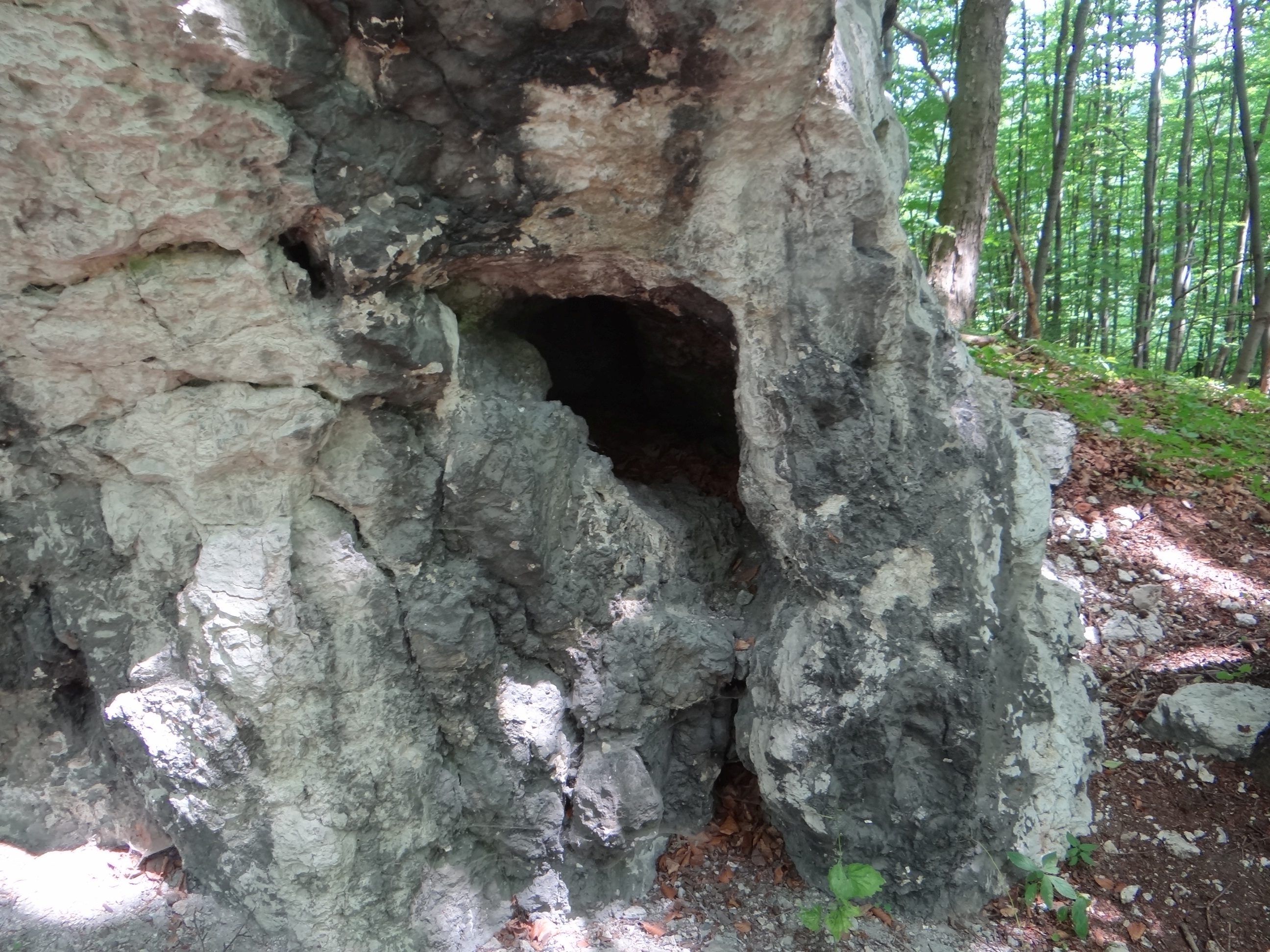 Ostra Bramka z Dziurką obok w skale Maniak Zadni na Maniakówce koło Jaroszowca